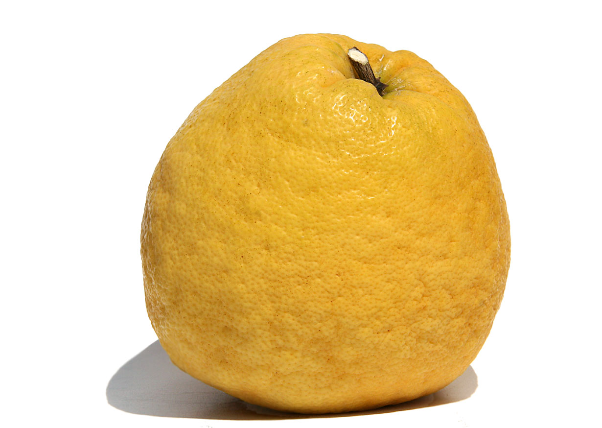 kawachi bankan le fruit